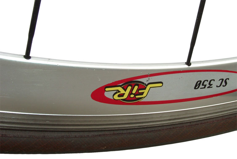 Motiv: Aerofelge, Modell „SC350“ von der Firma FiR. Aufnahmeort: Studio Aufnahmedatum: 26. Juni 2004 Fotograf: KMJ Aufnahmedaten Kamera: Casio QV-4000 Verschlusszeit: 1/80 Sek. Blende: 8,0 (Blendenpriorität) Brennweite: 7,13 mm (34,6 mm entsprechend 35-mm-Kleinbildformat) Blitz: ja Digitale Bearbeitung: KMJ (Adobe Photoshop) Bildname: Felge_01_KMJ.jpg Bildgröße: 768 Pixel × 515 Pixel (46.605 Bytes) Stichworte: Felge, Aerofelge, Reifen, Speiche, Laufrad, Fahrradtechnik; Bemerkungen: —